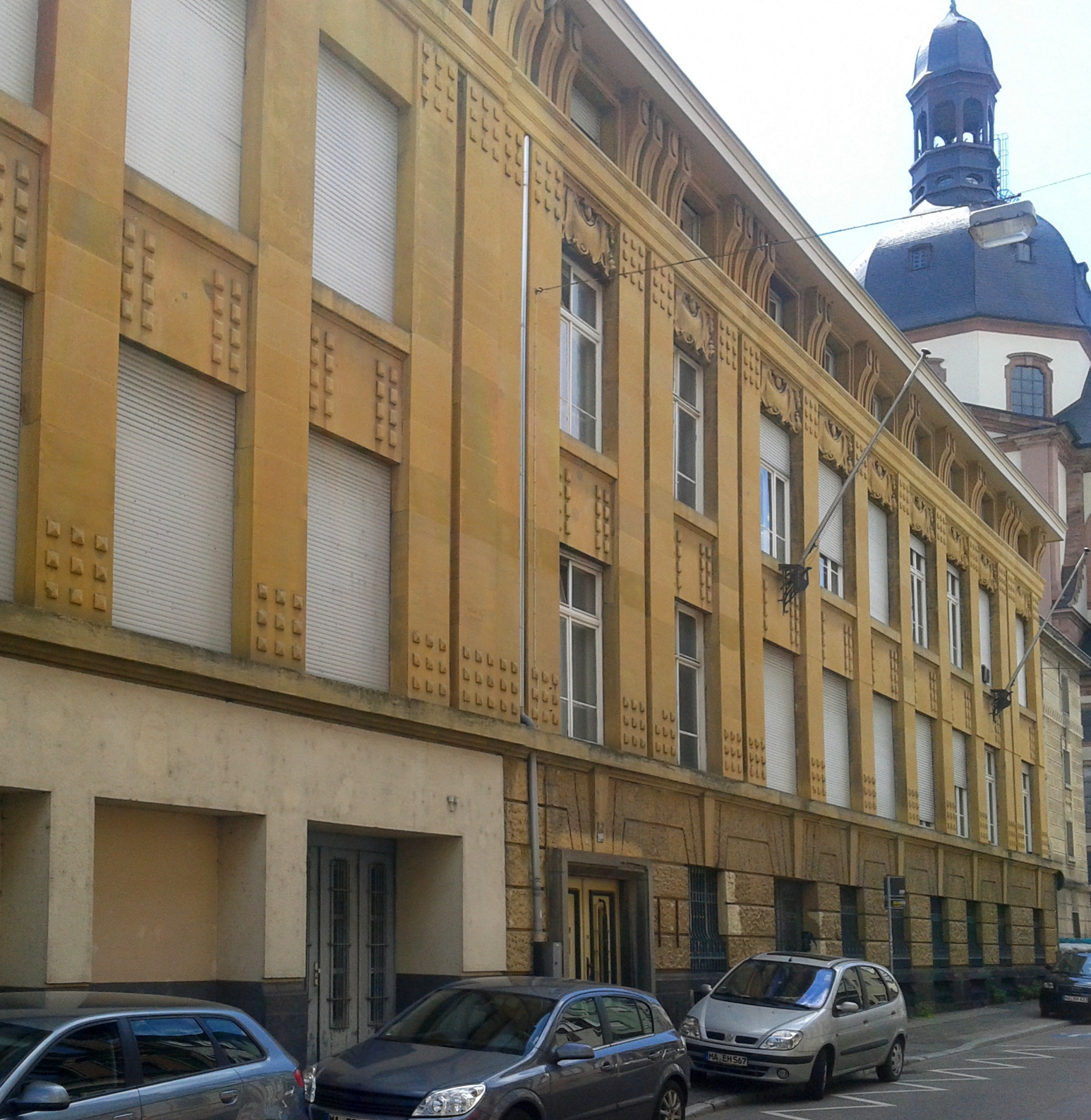 Der ehemalige rückwärtige Tresor- und Bürobau der Rheinischen Creditbank in Mannheim B4, 9-10a, heute genutzt von den Reiss-Engelhorn-Museen